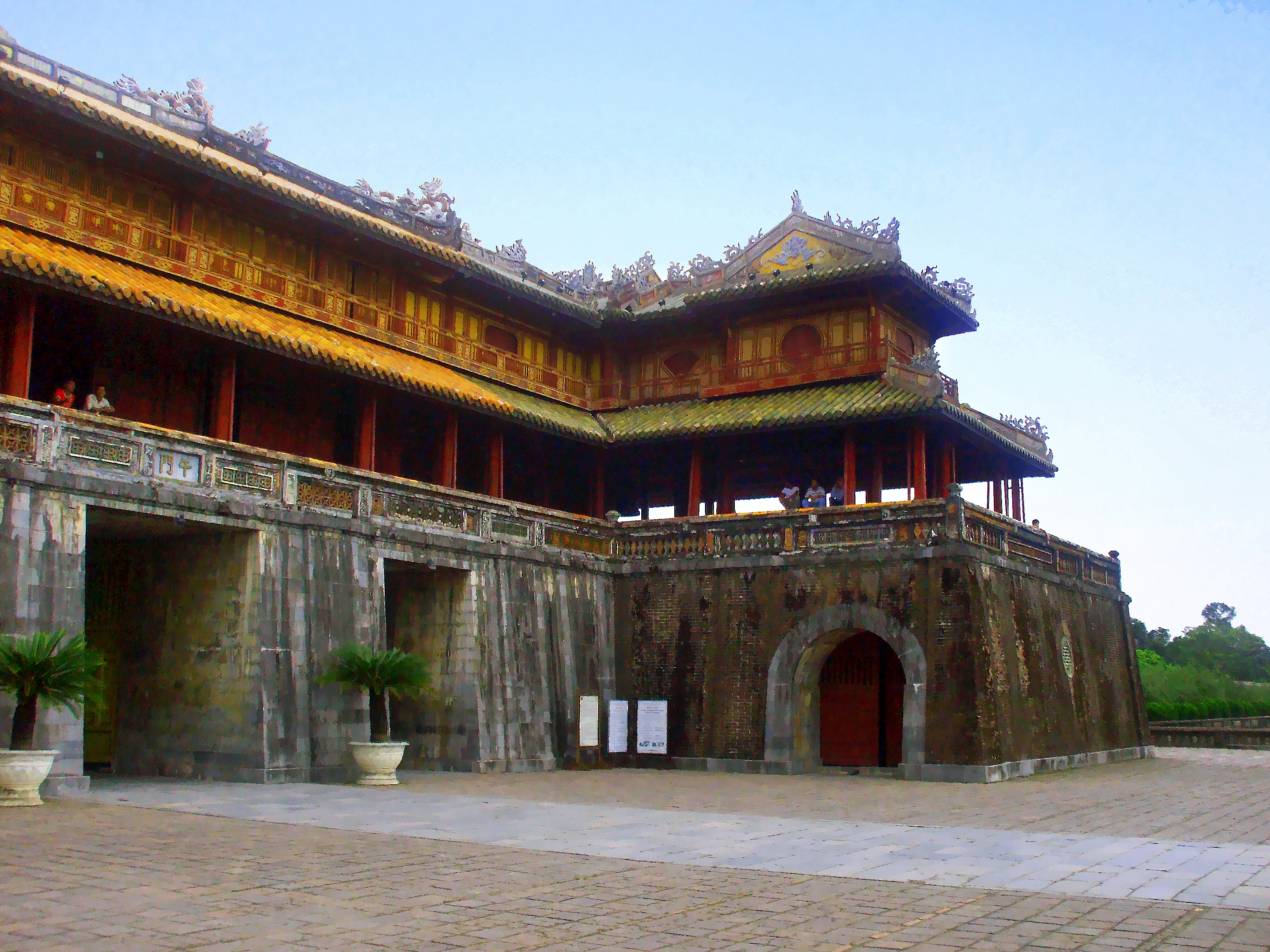 Ngọ Môn của Hoàng thành Huế (Việt Nam). Tại vị trí này, ngày 16 tháng 4 năm 1863, đã diễn ra cuộc tiếp đón phái đoàn của đô đốc Bonard đến Huế để làm lễ trao đổi Hòa ước Nhâm Tuất.